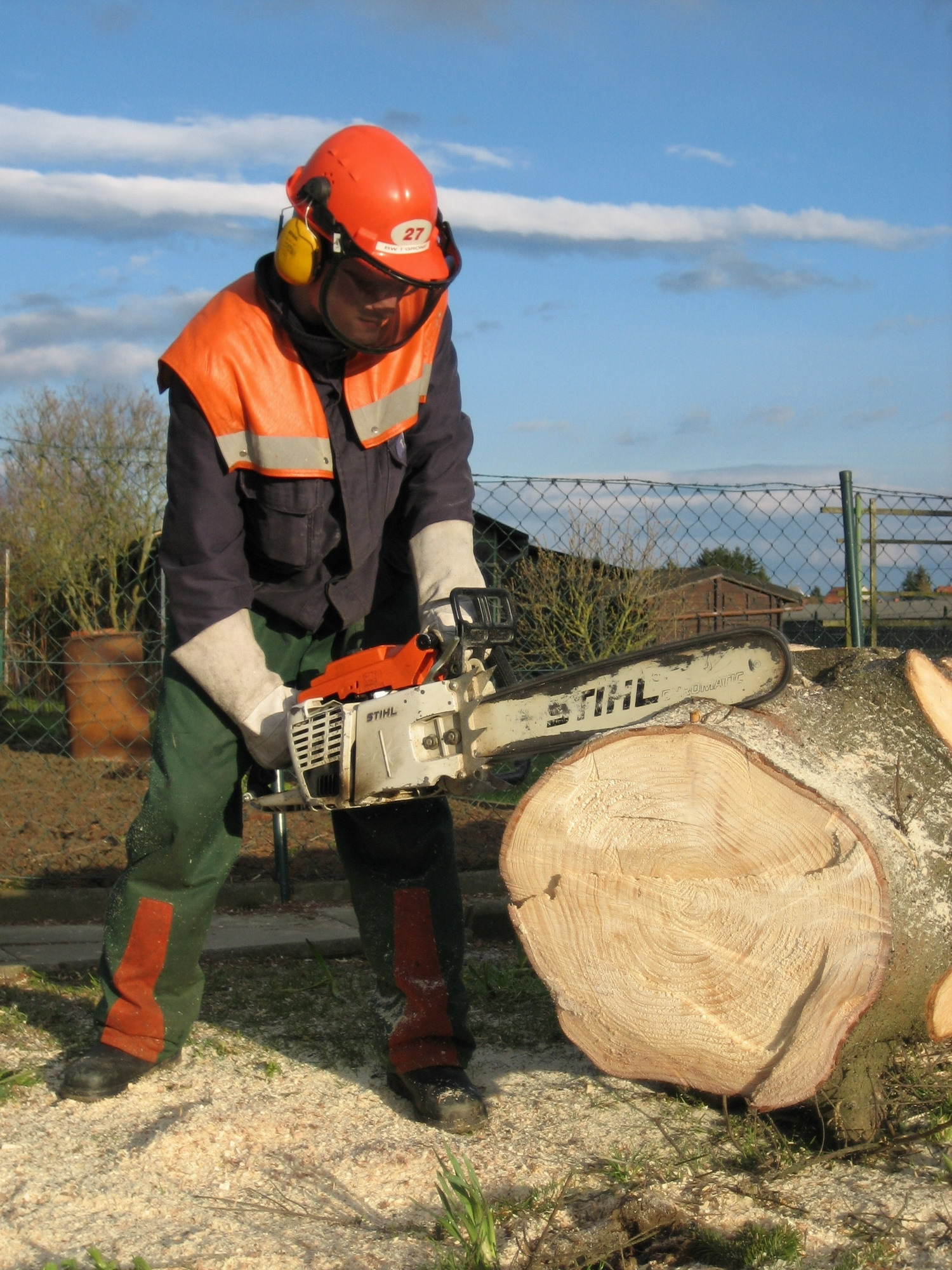 Einsatz einer Stihl-Kettensäge bei der Feuerwehr